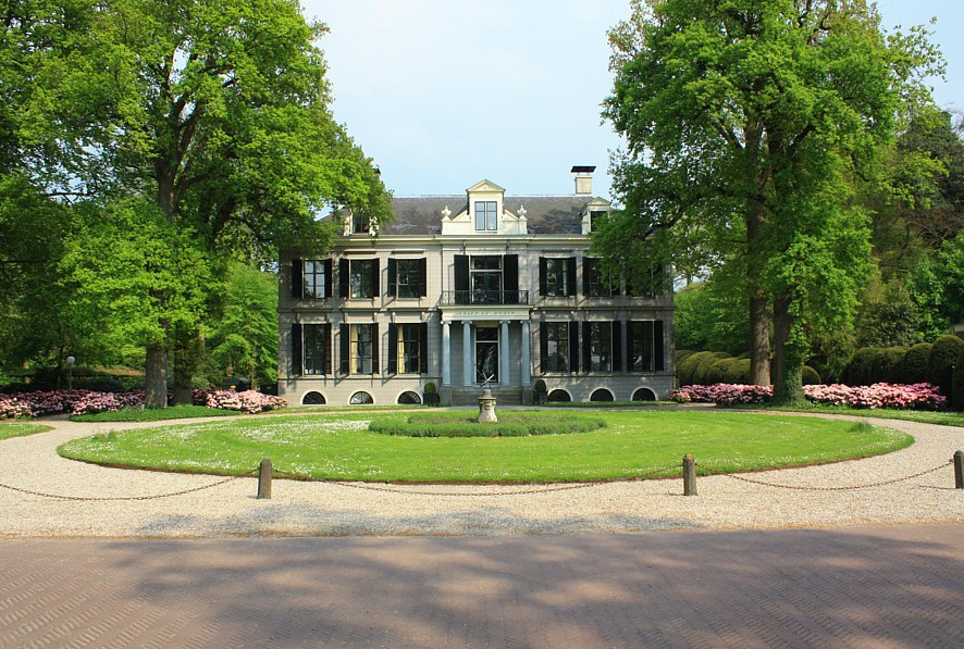 Huis SchaepenBurgh, 's Graveland